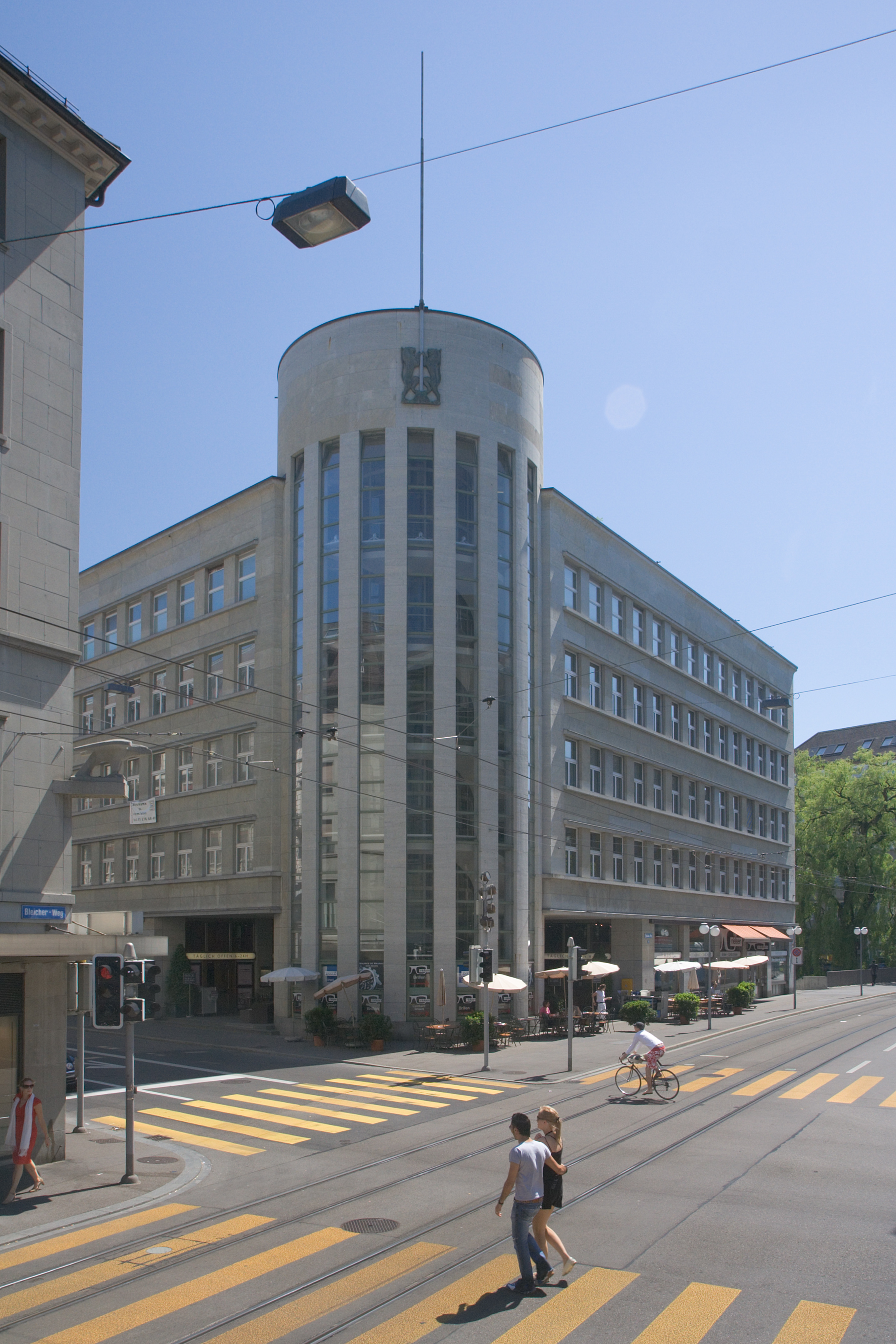 Alte Börse Zürich, Schweiz.